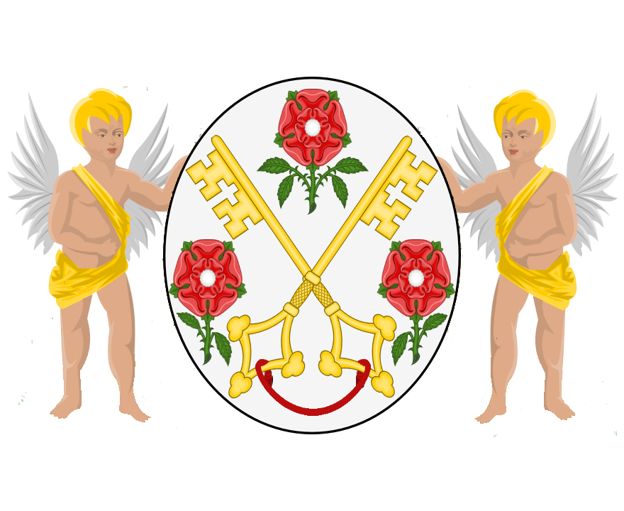 Recreació en colors de l'escut de 1601 que figura a la façana de l'Ajuntament del carrer Aleus.